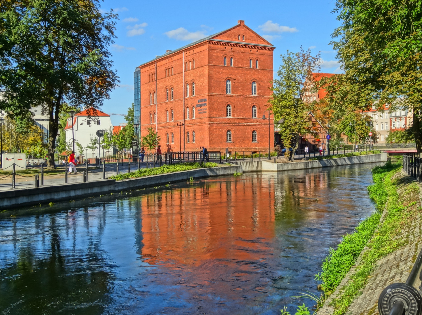 Czerwony Spichlerz na Wyspie Młyńskiej w Bydgoszczy; dawny młyn Camphausena z 1861 r., od 2009 r. mieści galerię sztuki nowoczesnej